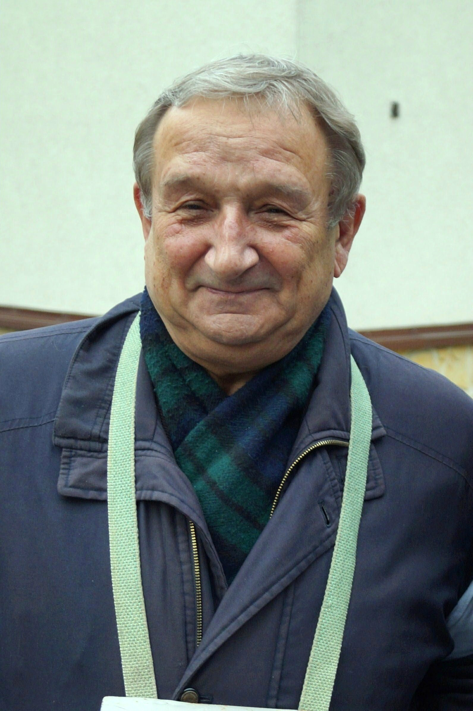 Kazimierz Kaczor, aktor.